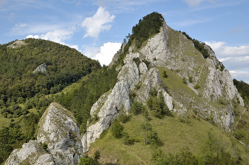 Vršatské bradlá